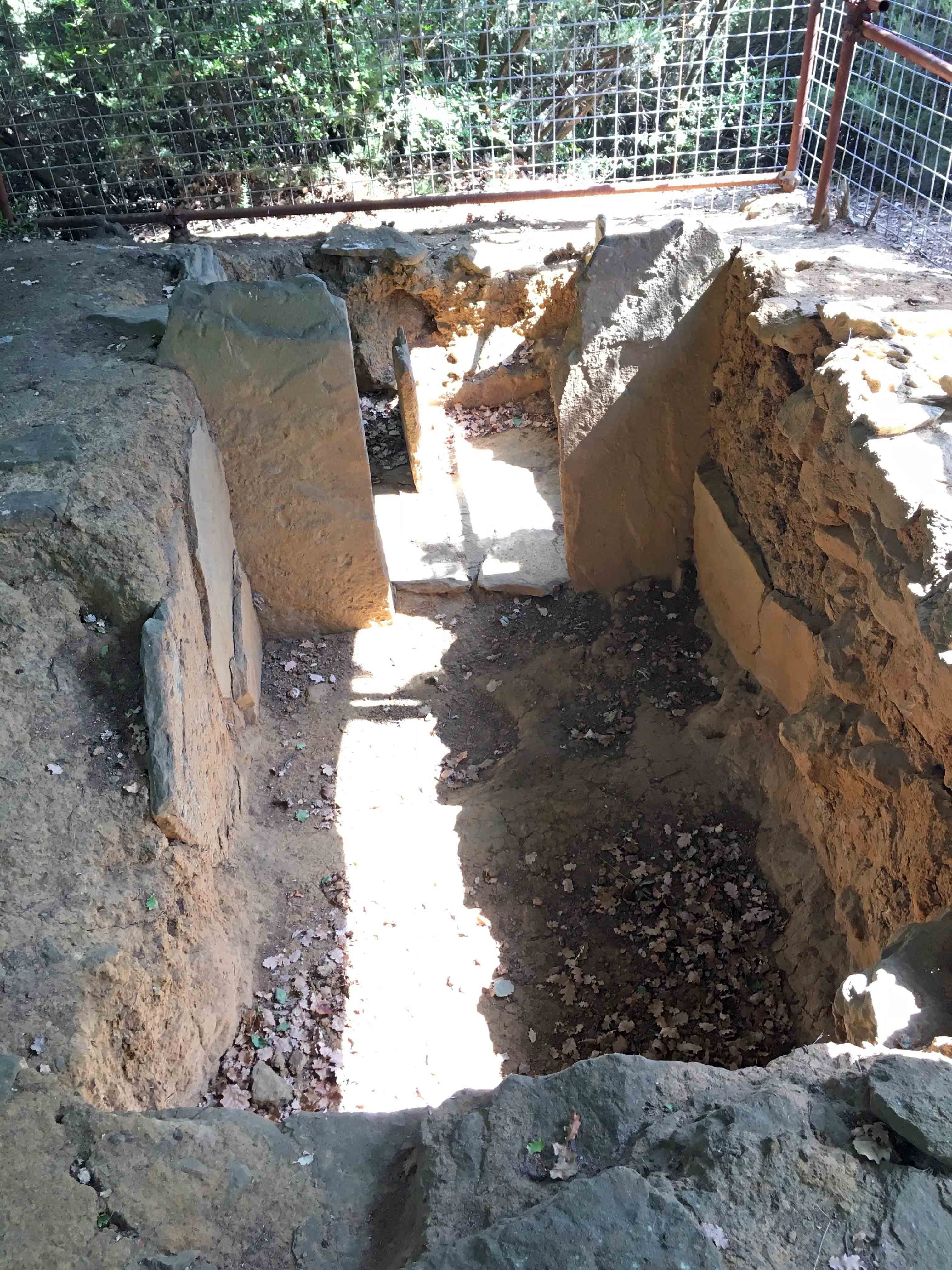 Interno del Tumulo X nella necropoli di Prato Rosello